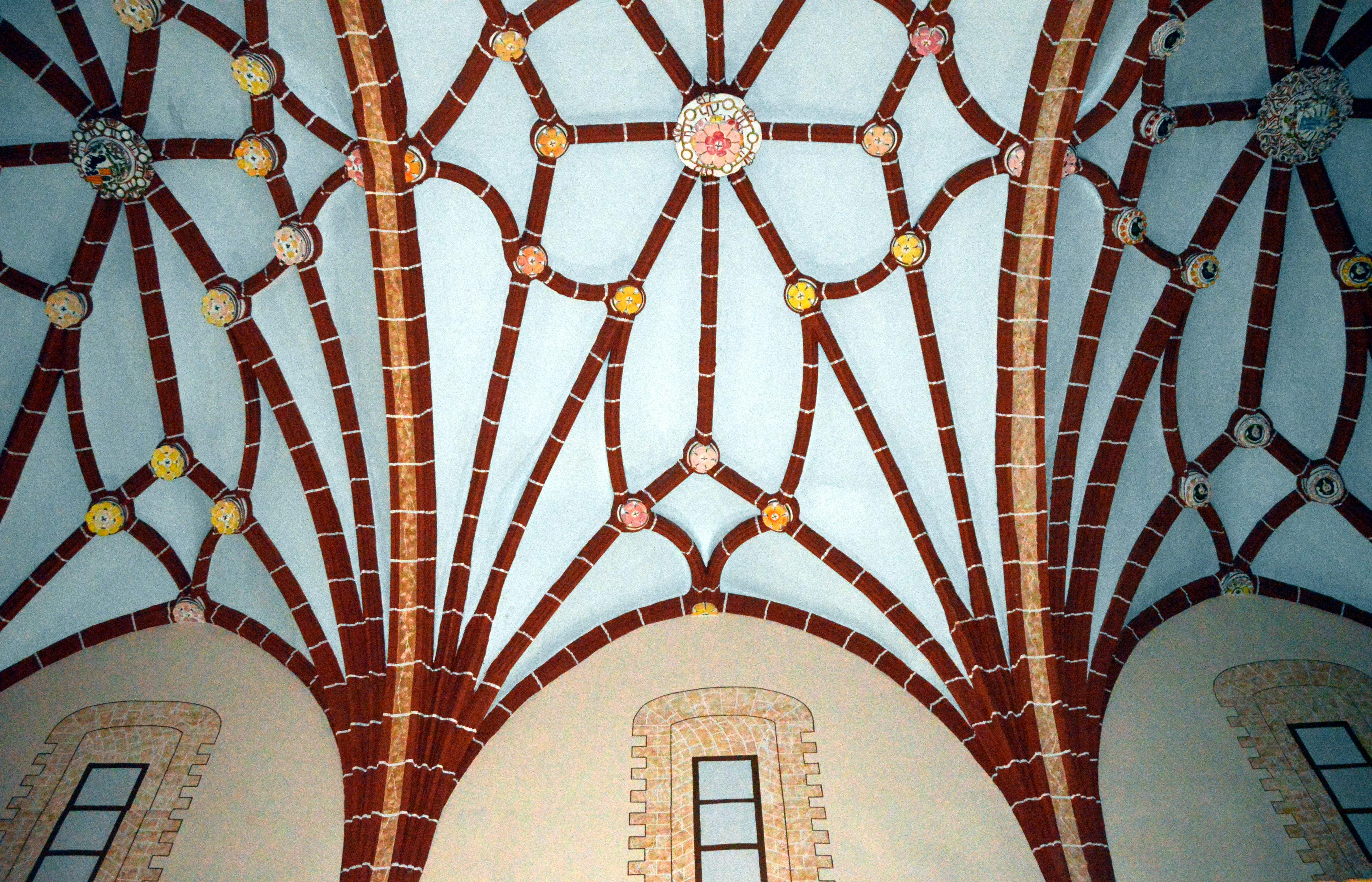 Nave del Santuario de la Fuensanta en Villel (Teruel), con detalle de la tracería gótica estrellada, lado del evangelio (2019).